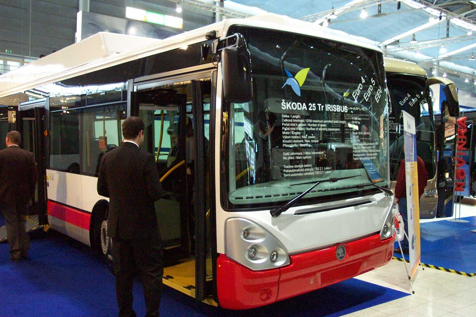 Trolleybus Škoda 25Tr at Autotec trade fair at Brno - Bratislavský trolejbus typu Škoda 25Tr na veletrhu Autotec v Brně